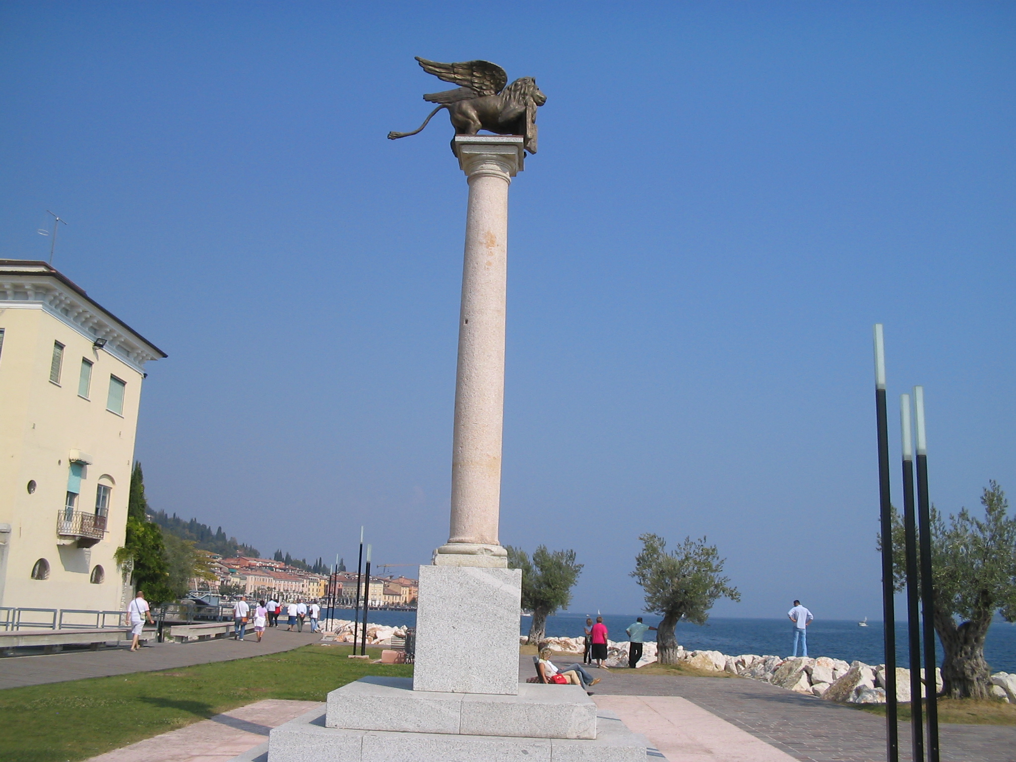 Colonna col Leone di San Marco presso il porto di Salò